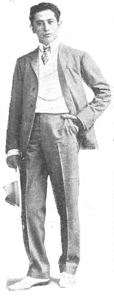 Antonio Fuentes, de Compañy. Fotografía de Manuel Compañy.